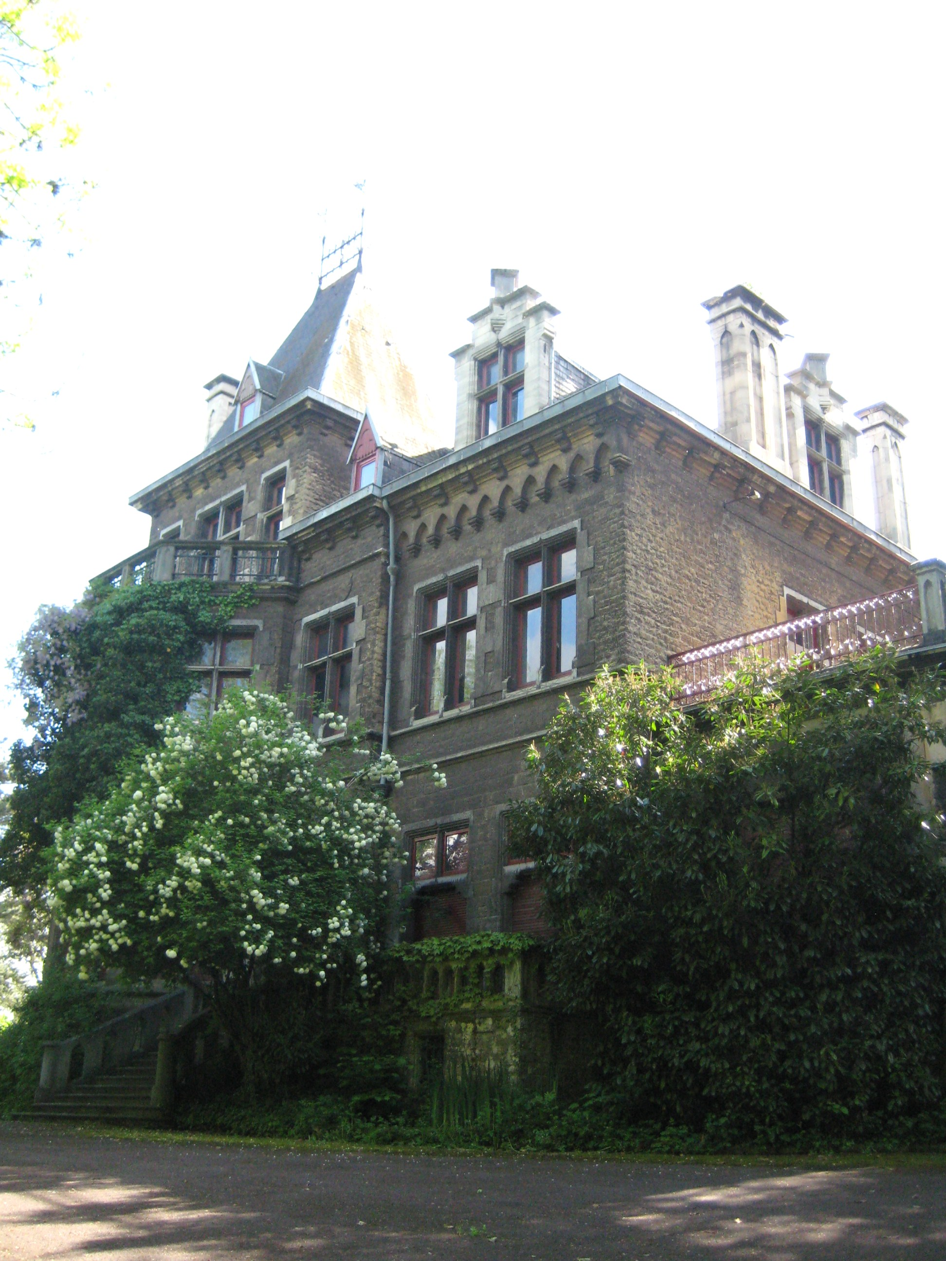 Description Chateau d'Homécourt Date18 May 2009Sourcemon appareil photoAuthorAimelaime Chateau d'Homécourt